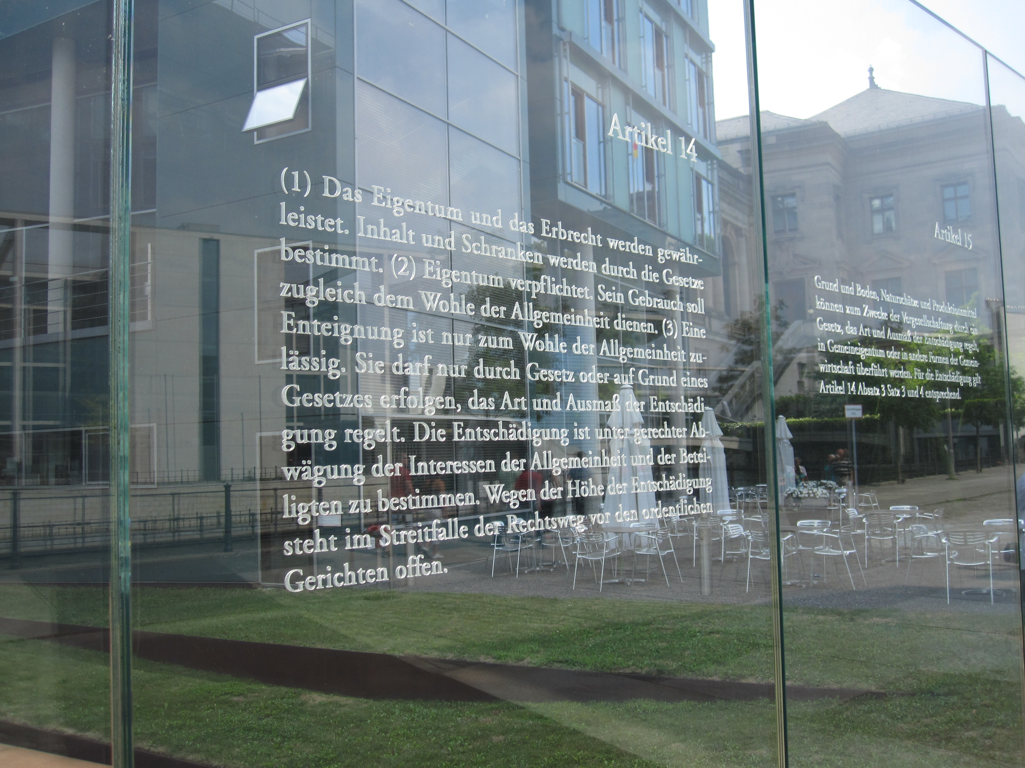 Bundestagsgebäude in Berlin: Der israelische Künstler Dani Karavan hat in drei Meter hohe Glasscheiben, die einen Außenhof des Jakob-Kaiser-Hauses im Uferbereich zur Spree begrenzen, die 19 Grundrechtsartikel des Grundgesetzes mit Laser eingraviert. „Die Grundrechtsartikel schweben gleichsam in Augenhöhe vor dem Haus der Fraktionen, dem Jakob-Kaiser-Haus“ (Andreas Kaernbach, Deutscher Bundestag).